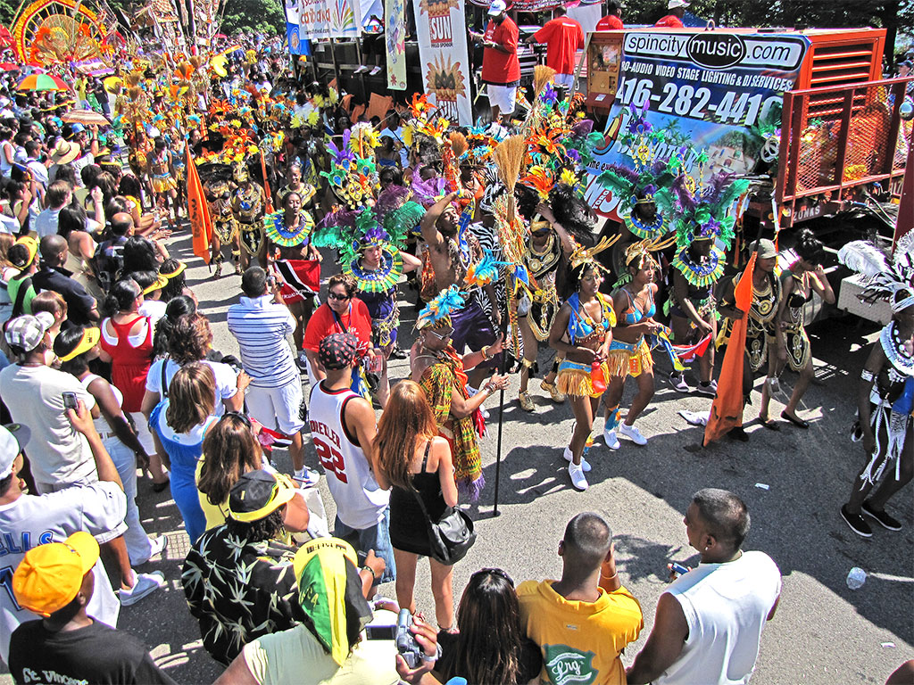 caribana parade 2009